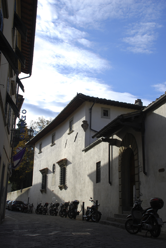 Villa Il Gioiello (the last home of Galileo Galilei), Florence, Italy. Overview from Via Pian dei Giullari.